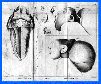 Anencéphale et notencéphale